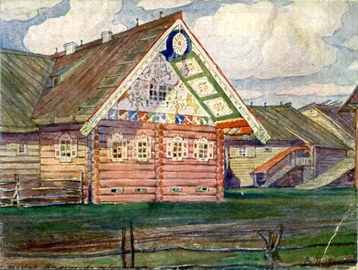 Дом крестьянина в деревне Шелекса, Архангельской губернии. Открытка Общества возрождения художественной Руси.